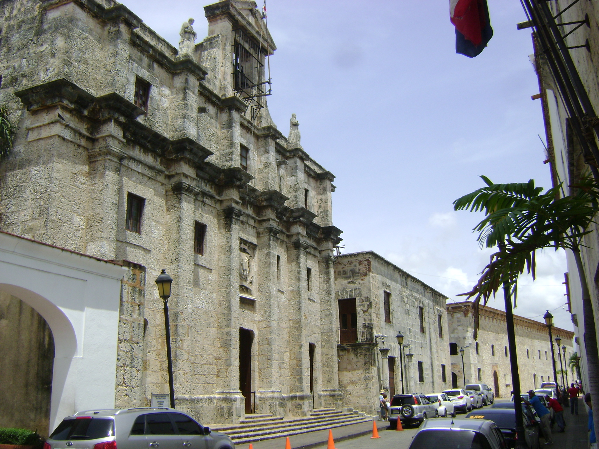 Calle Las Damas met Panteon, Casa Real oud, Casa Real nieuw.